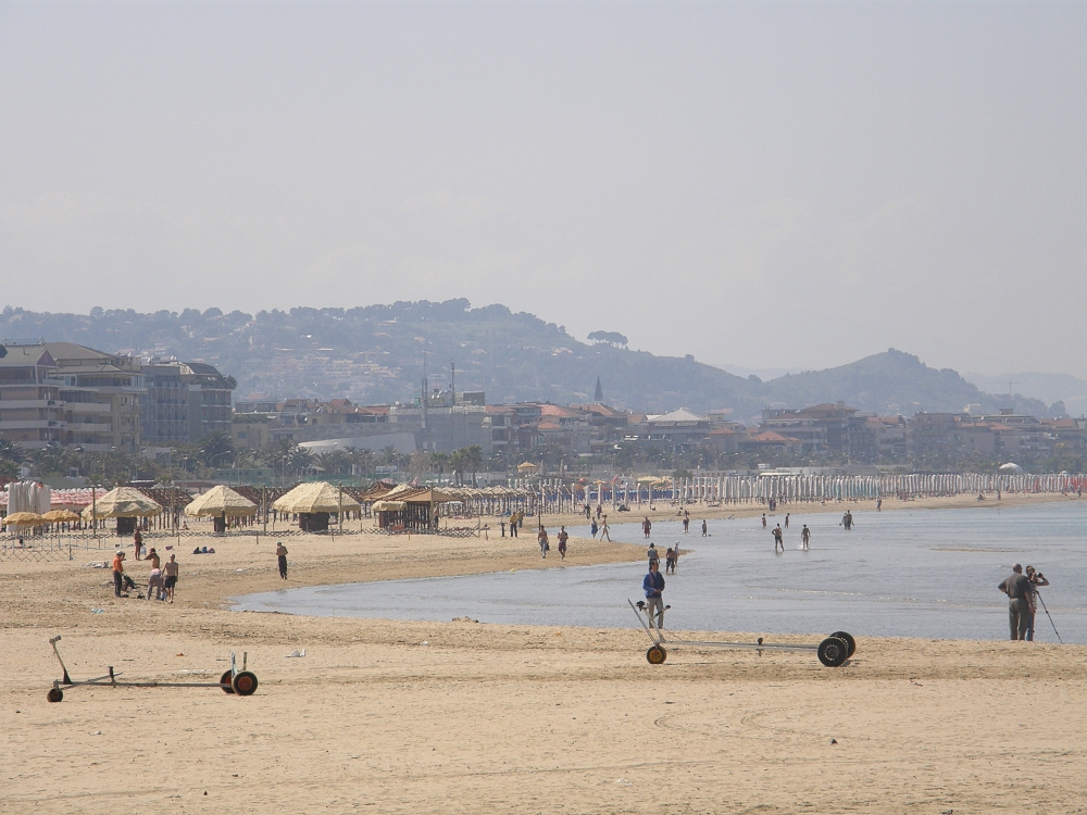 Am Strand Lungomare Giacomom Matteotti im Centrum von Pescara